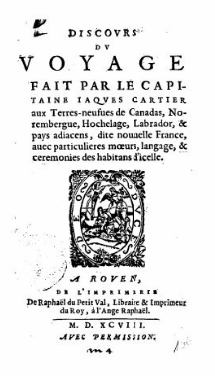 Jacques Cartier, Discours, 1598. Title page